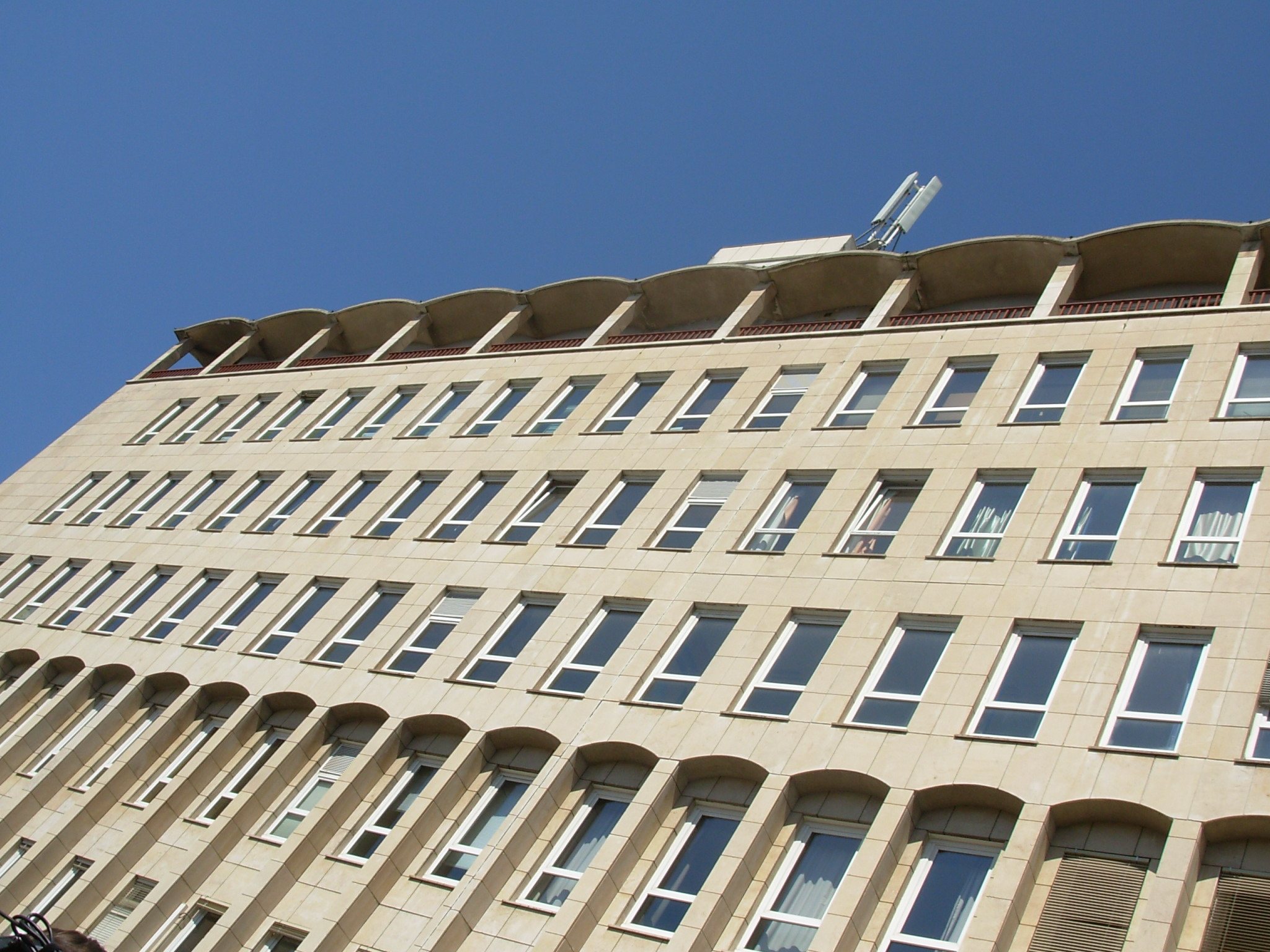 Façade de la faculté de lettres d'Aix-en-Provence